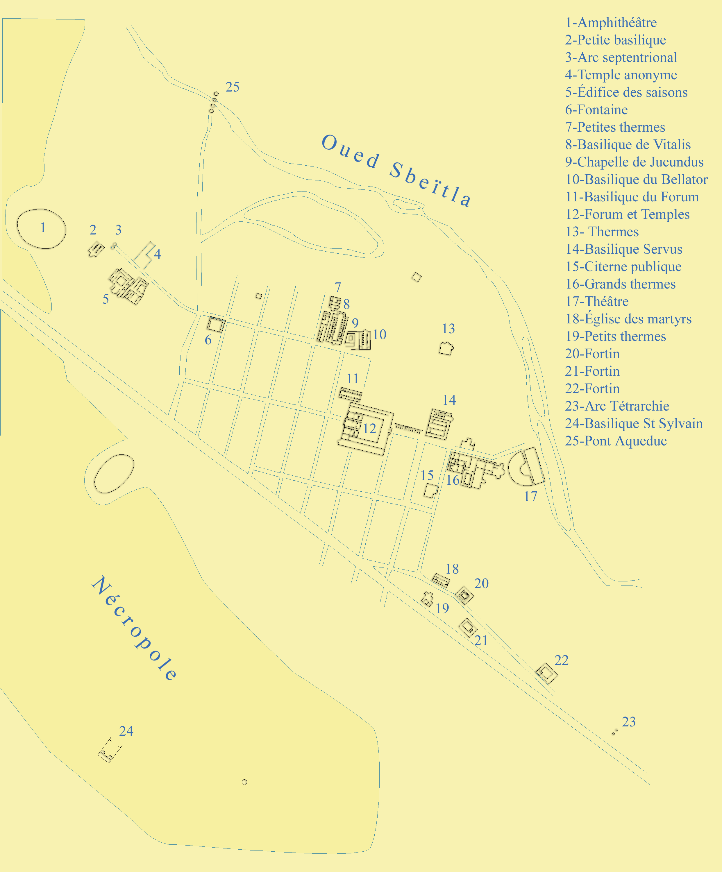 Carte du Site archéologique de Sbeïtla